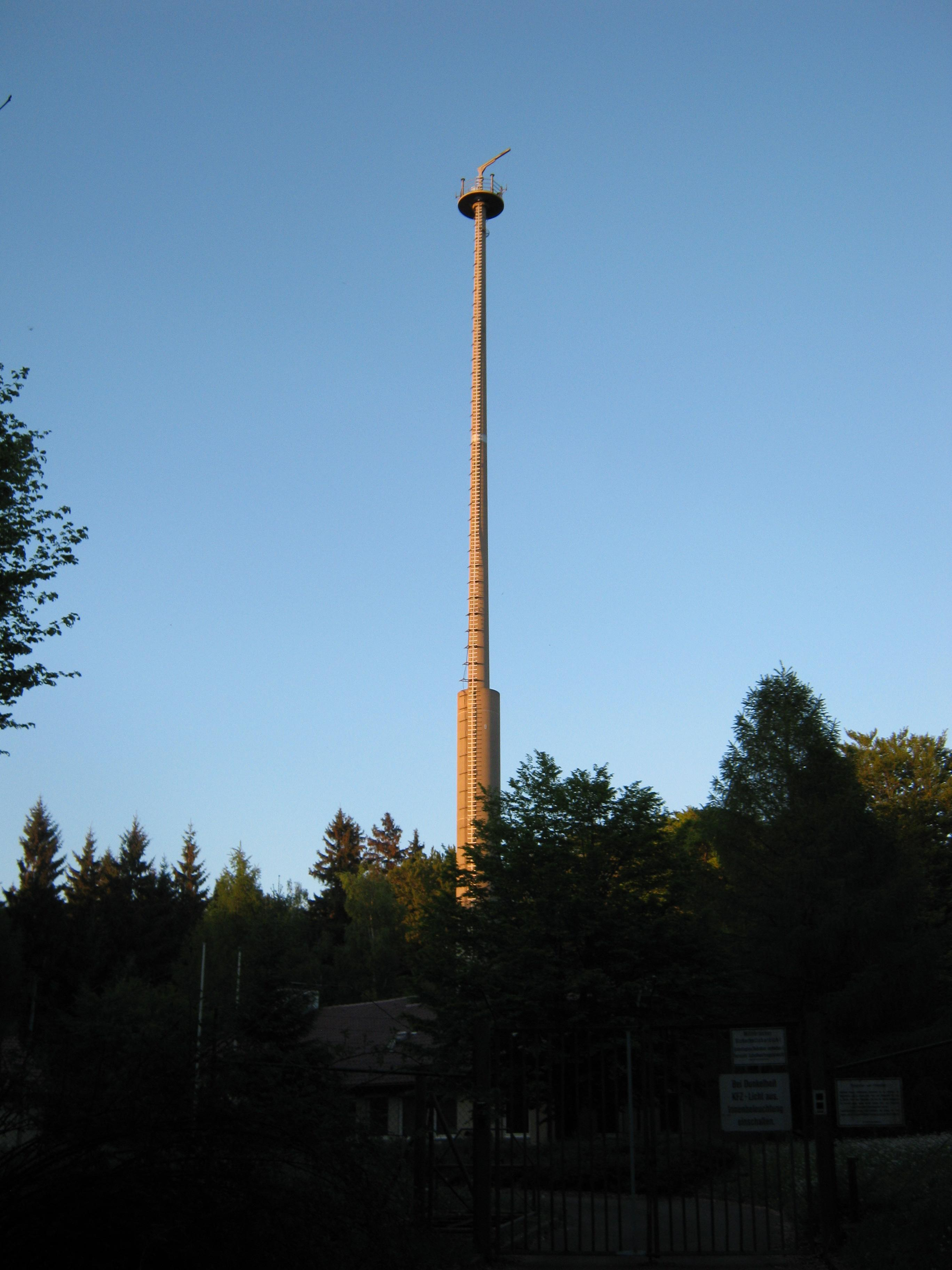 Funkturm Bartholomä, Höhe: 61 Meter - OpenStreetMap(Info)